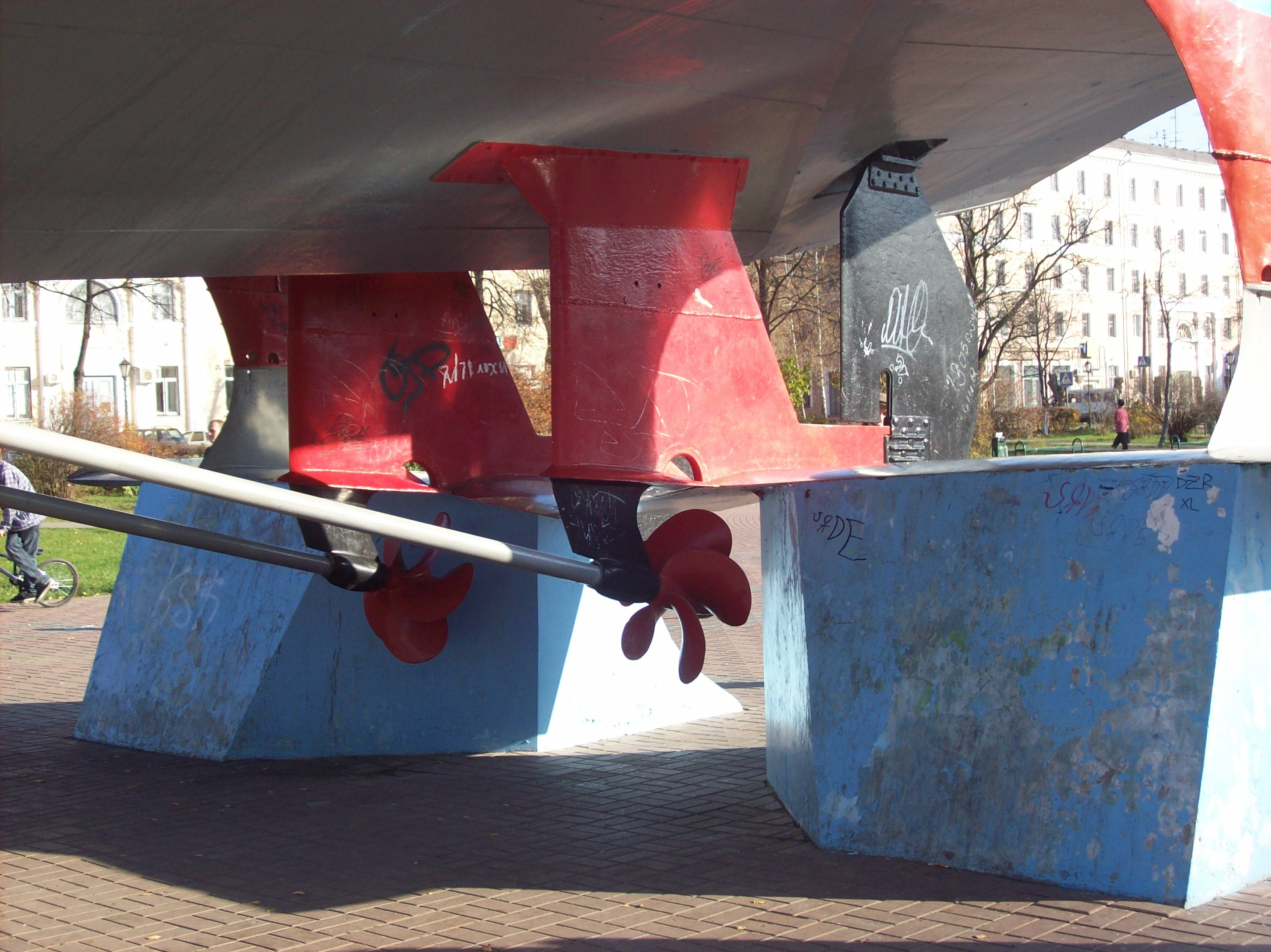 Метеор на постаменте в Сормове (Нижний Новгород)